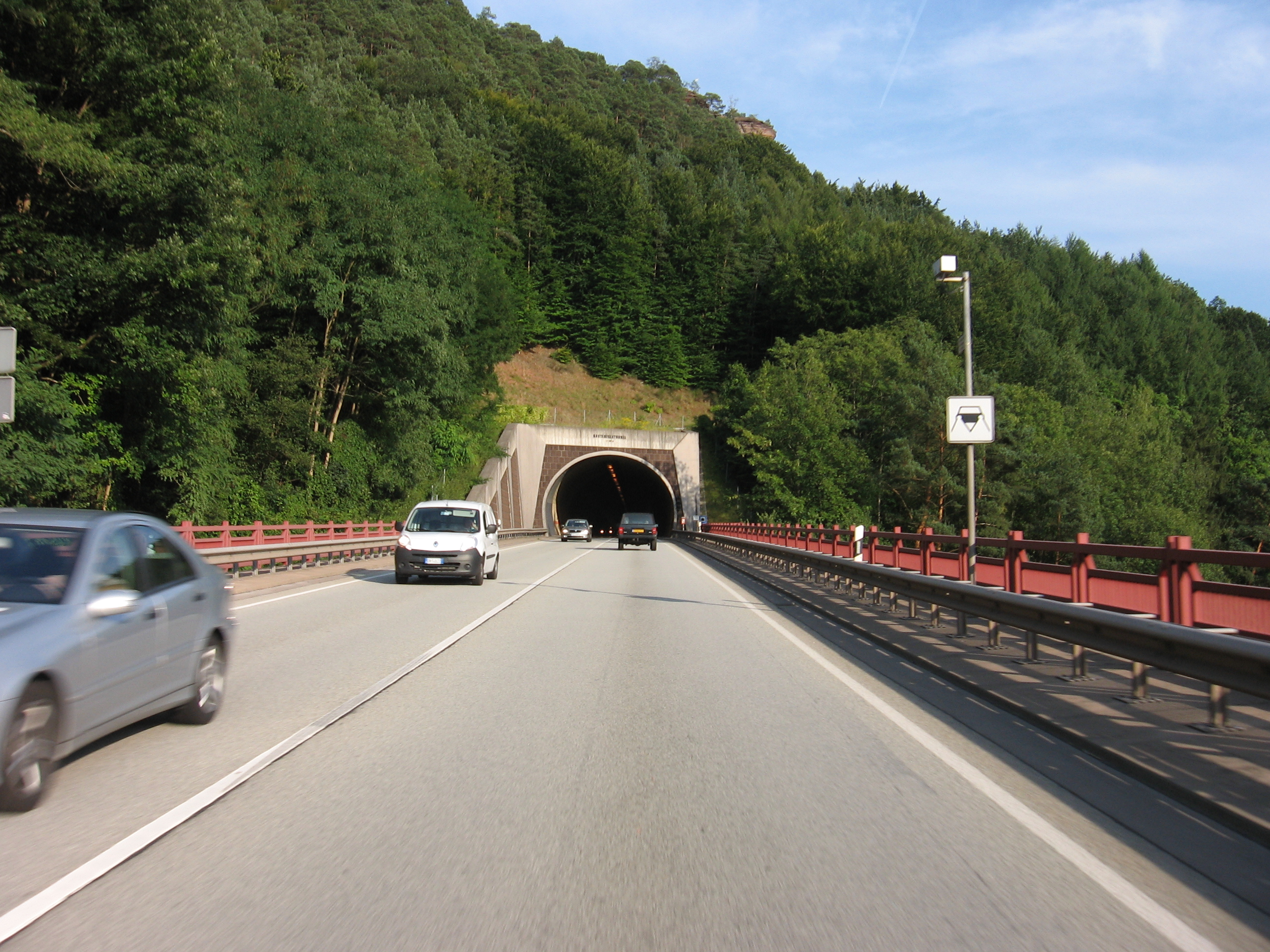 Bundesstraße 10, Kostenfelstunnel bei Rinnthal